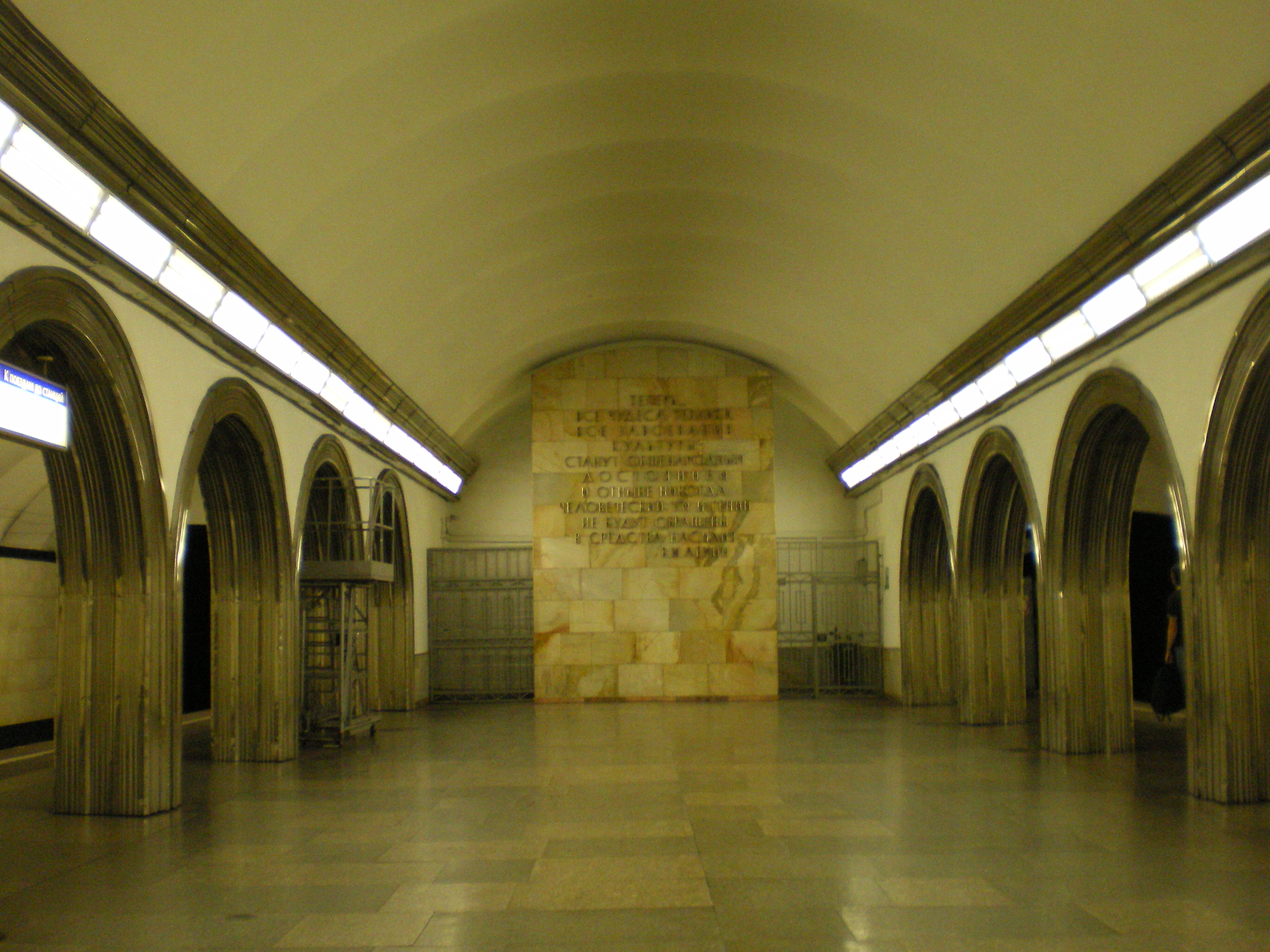 Станция метро «Академическая». Глухая стена.